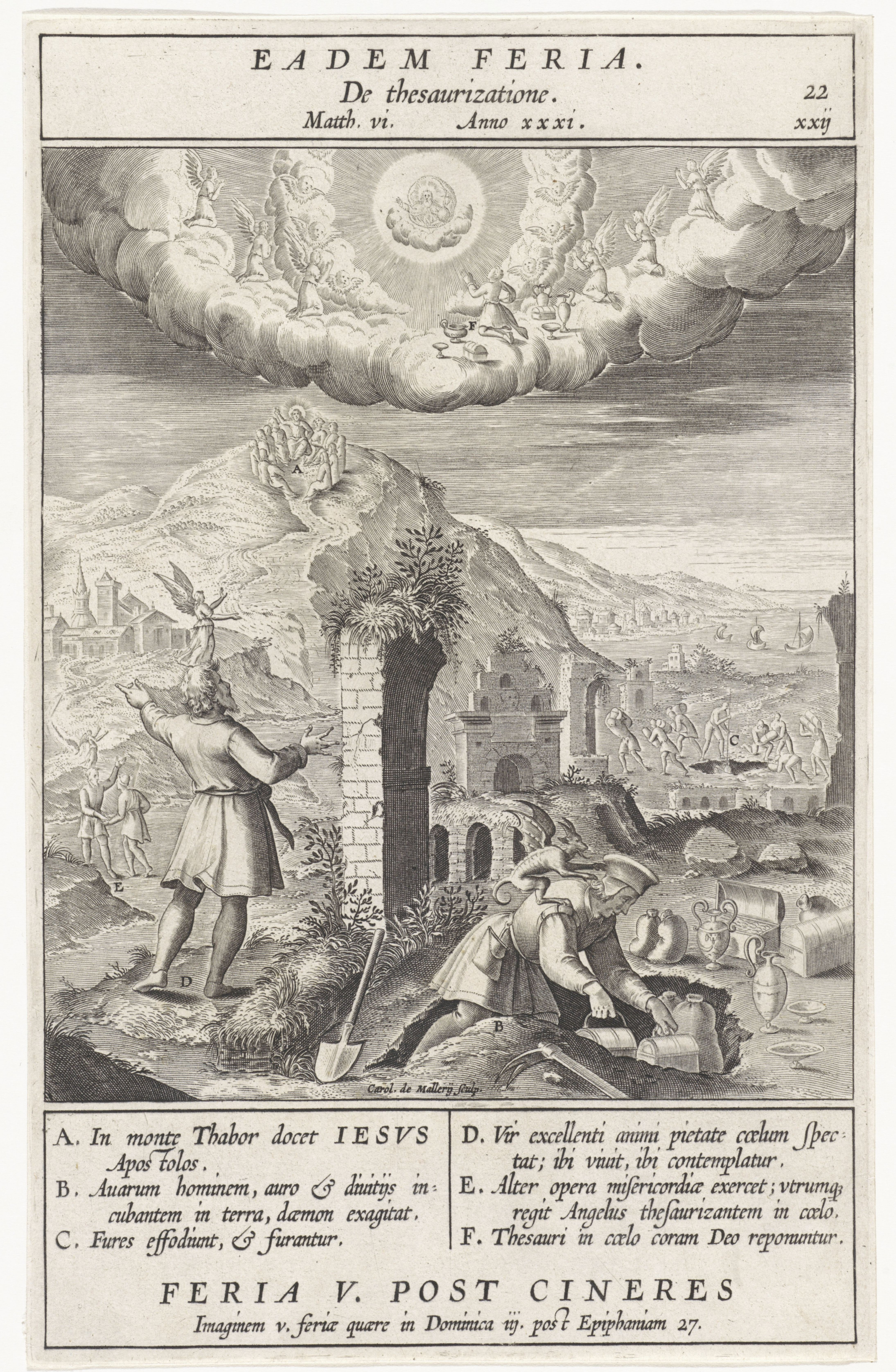 IdentificatieTitel(s): De huichelaar verzamelt schatten. Eadem Feria (titel op object)Objecttype: prent Serienummer: 22/153Objectnummer: RP-P-OB-67.152Catalogusreferentie: Hollstein Dutch 71Opschriften / Merken: verzamelaarsmerk, verso rechtsonder, gestempeld: Lugt 2165Omschrijving: De huichelaar, met een duivel boven het hoofd, begraaft zijn schatten in de aarde. De gelovige, met een engel boven het hoofd, wacht met het verzamelen van schatten tot hij in de hemel is. Uitbeelding van Mat. 6:19-21: "Verzamel schatten in de hemel, daar vreten mot noch roest ze weg, daar breken geen dieven in om ze te stelen." Bij verschillende elementen uit de voorstelling staan letters die corresponderen met de legenda in de marge.VervaardigingVervaardiger: prentmaker: Wierix (verworpen toeschrijving) prentmaker: Karel van Mallery (vermeld op object) naar ontwerp van: Bernardino PasseriPlaats vervaardiging: AntwerpenDatering: 1593Fysieke kenmerken: gravureMateriaal: papier Techniek: graveren (drukprocedé)Afmetingen: plaatrand: h 233 mm × b 145 mmToelichtingPrent gebruikt in: Nadal, Jerónimo. Evangelicae Historiae Imagines. Antwerpen: Martinus Nutius, 1593.OnderwerpWat: do not lay up earthly treasures ~ doctrine of Christ on possessions (Matthew 6:19; Luke 12:21)Christ's sermon on the mount (Matthew 5-7)Verwerving en rechtenVerwerving: onbekendCopyright: Publiek domein